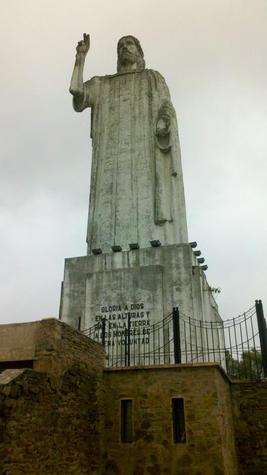 Cristo Redentor en 2013